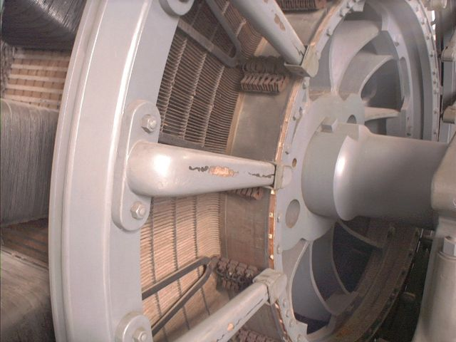 Blick auf den Kommutator eines großen Elektromotors, eigenes Bild